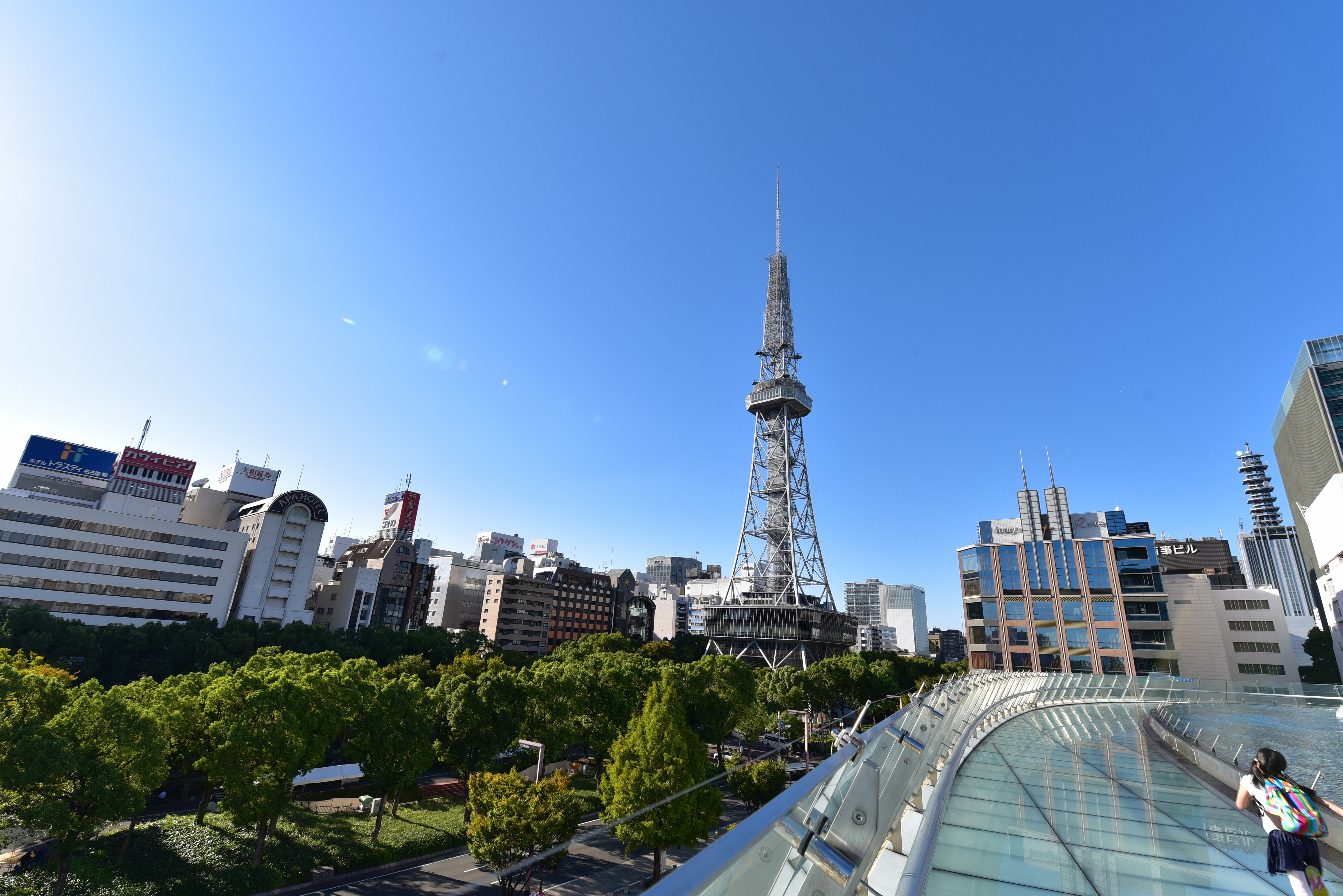 オアシス２１から久屋大通を望む